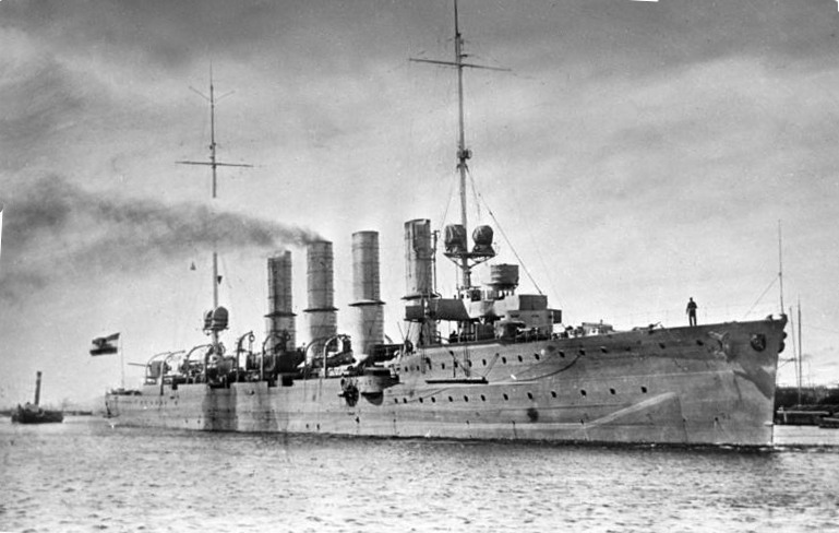 Kleiner Kreuzer "SMS Breslau" Kleiner Kreuzer "S.M.S. Breslau" der Magdeburg-Klasse, Ansicht der Steuerbord-Seite